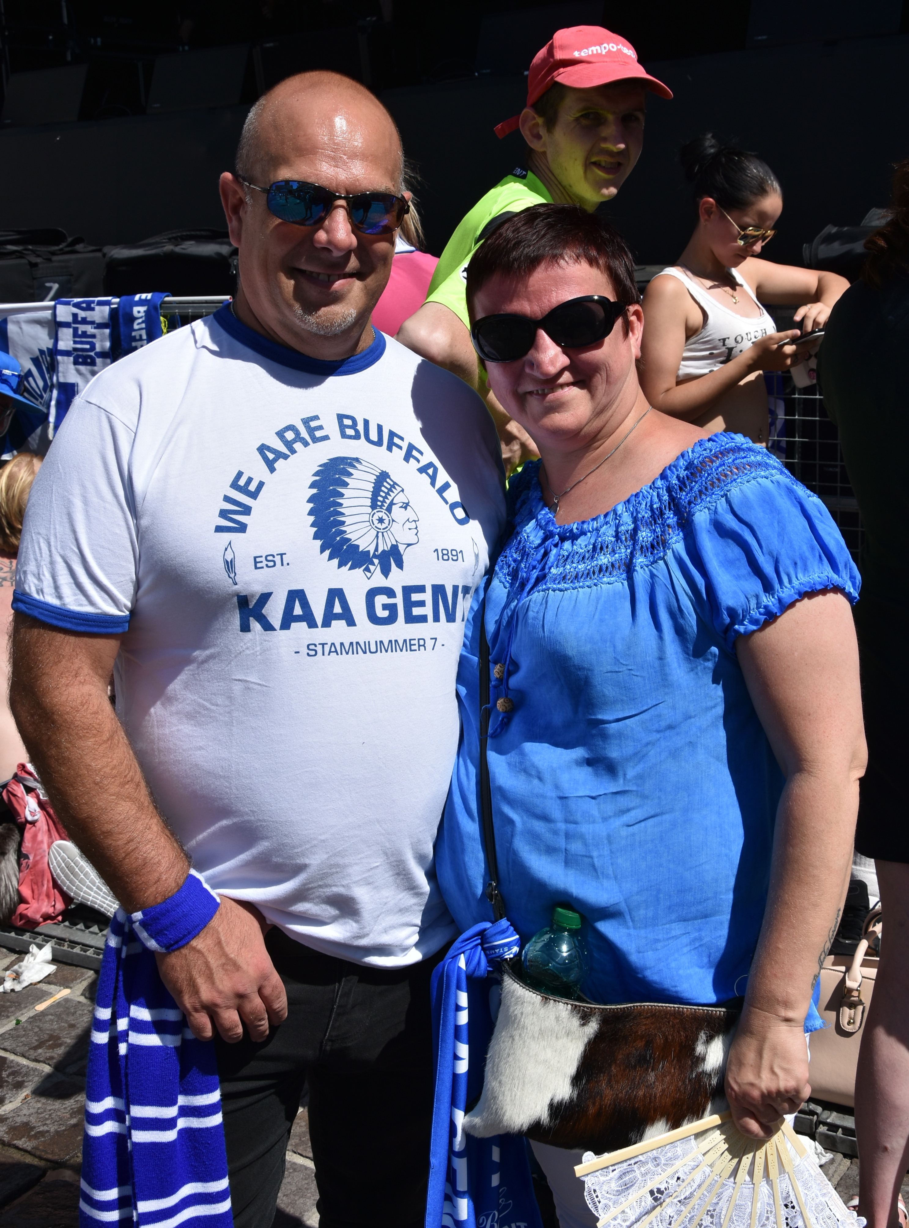 Gentse Feesten 2019 22-07-2019 15-28-53 This photo of movable heritage has been taken in the Flemish Region